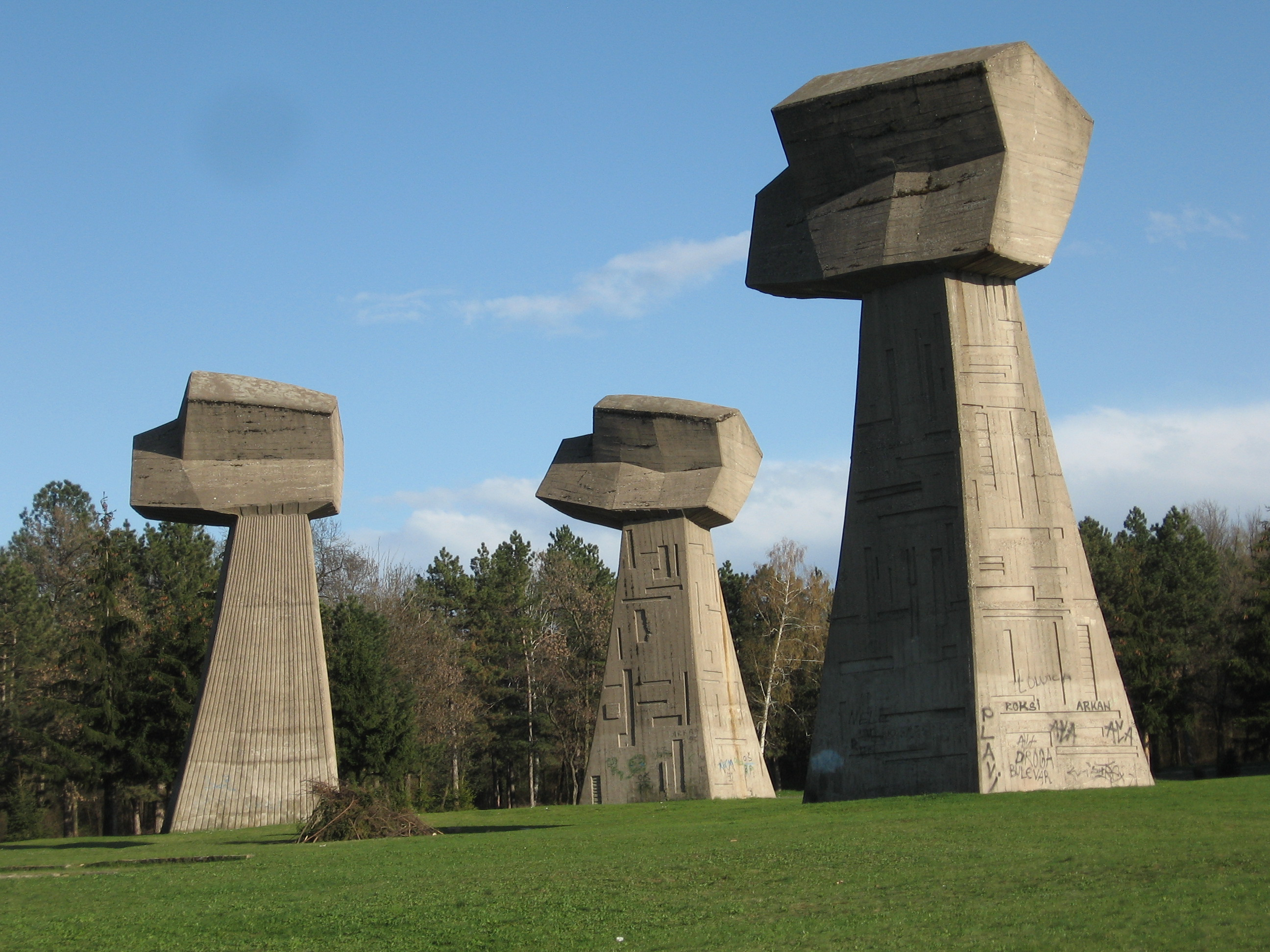 Песнице